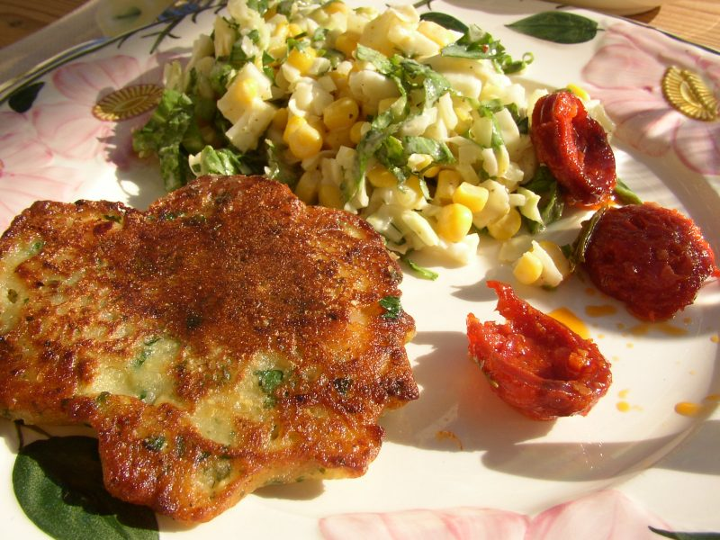 Tortillita de camarones Rezept